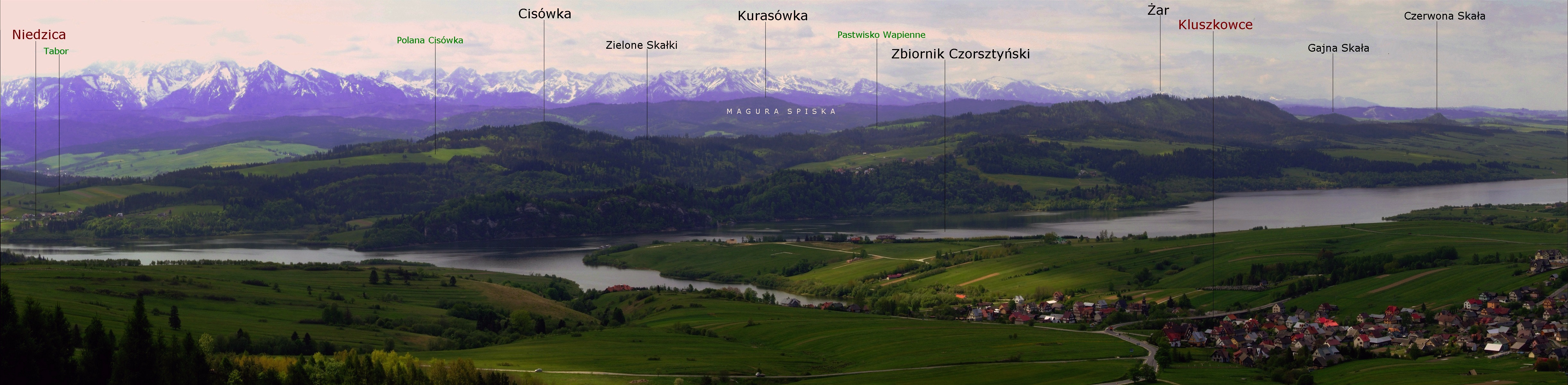 Widok z podnóży góry Wdżar na Pieniny spiskie i Tatry